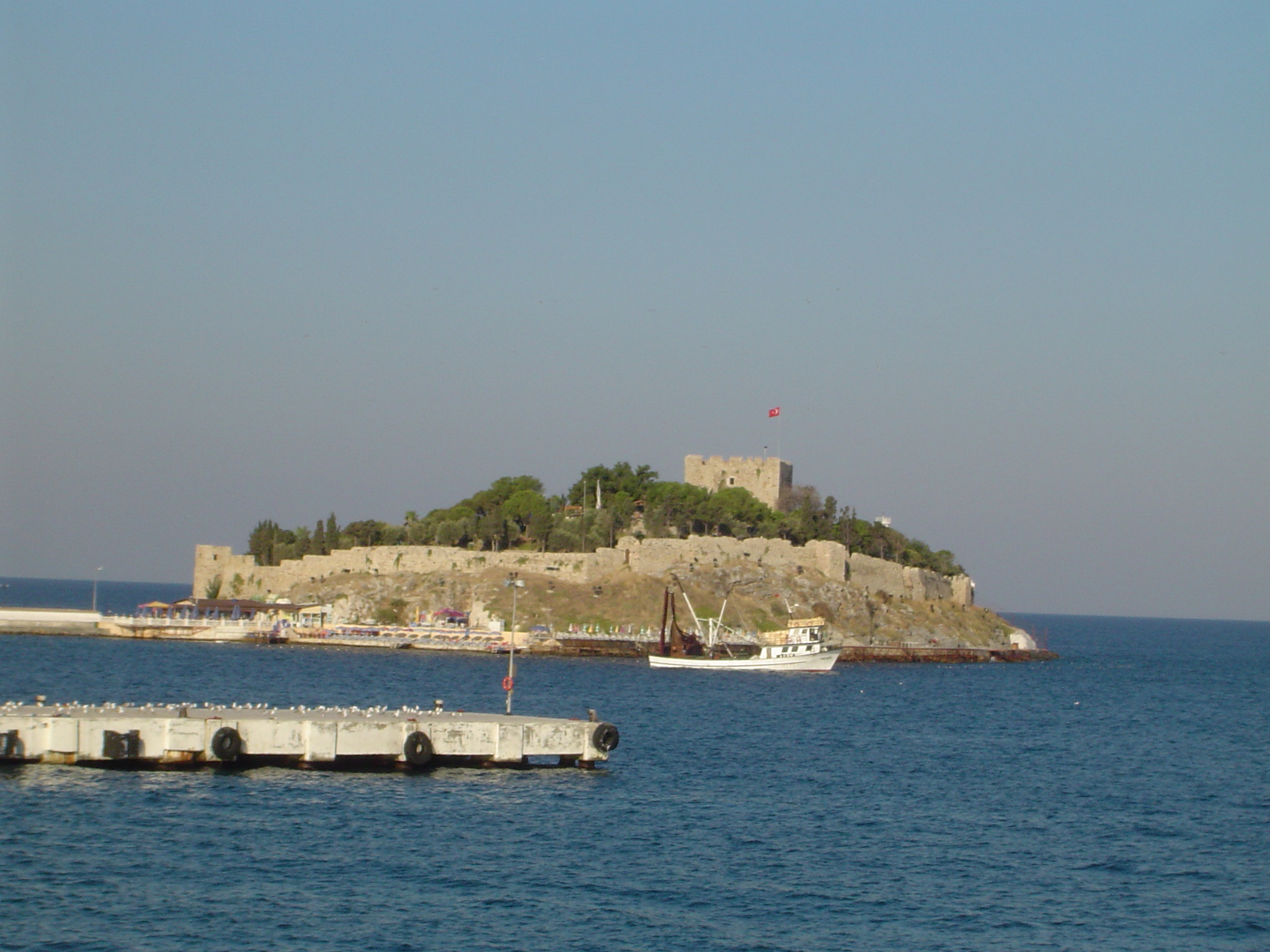 Sujet: D'Buerginsel vu Kusadasi (2005).